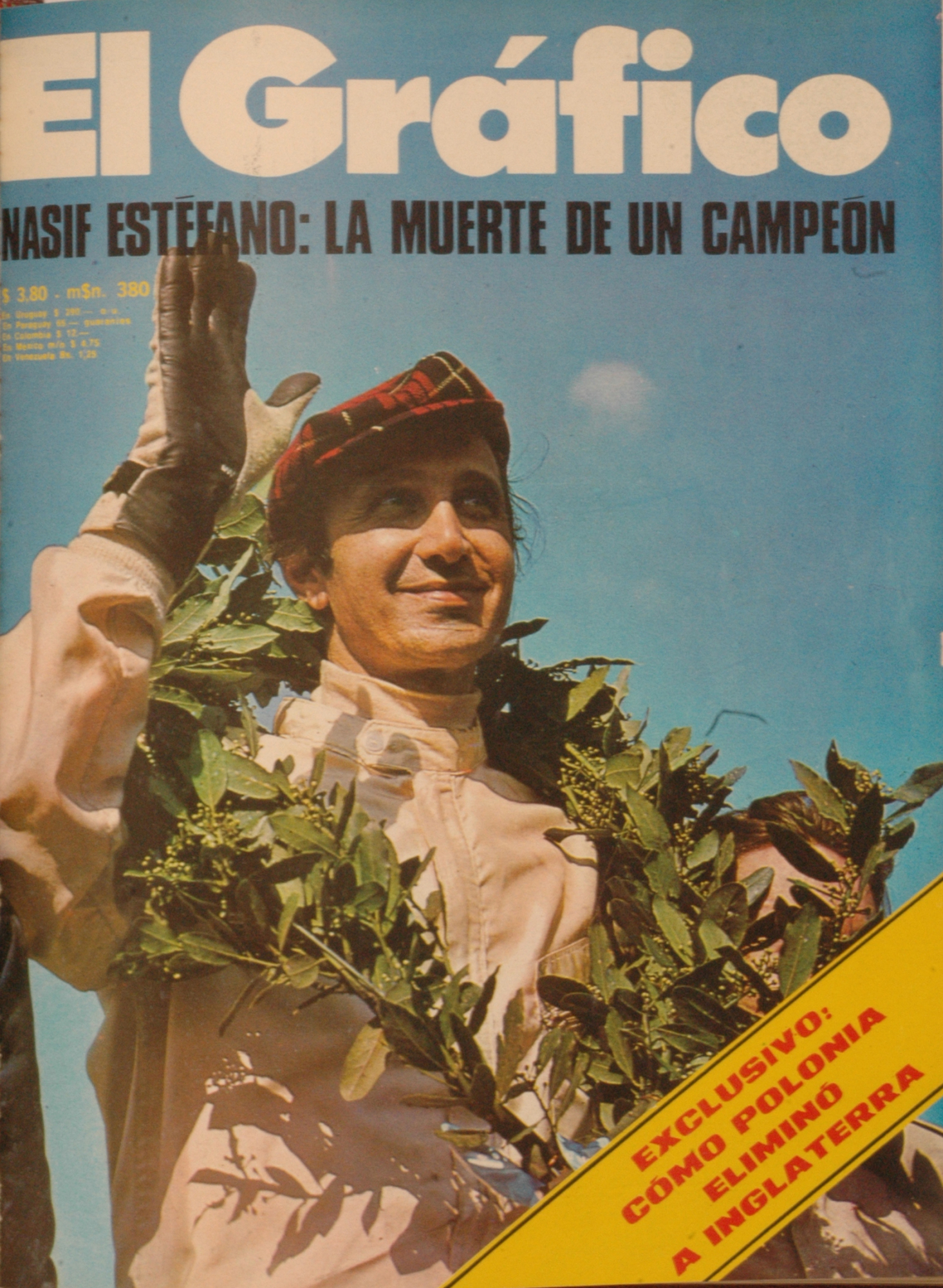 El Grafico del 23 de Octubre de 1973. Edicion 2820